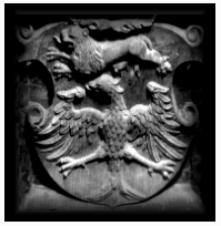 Das Wappen der Andechs-Meranier